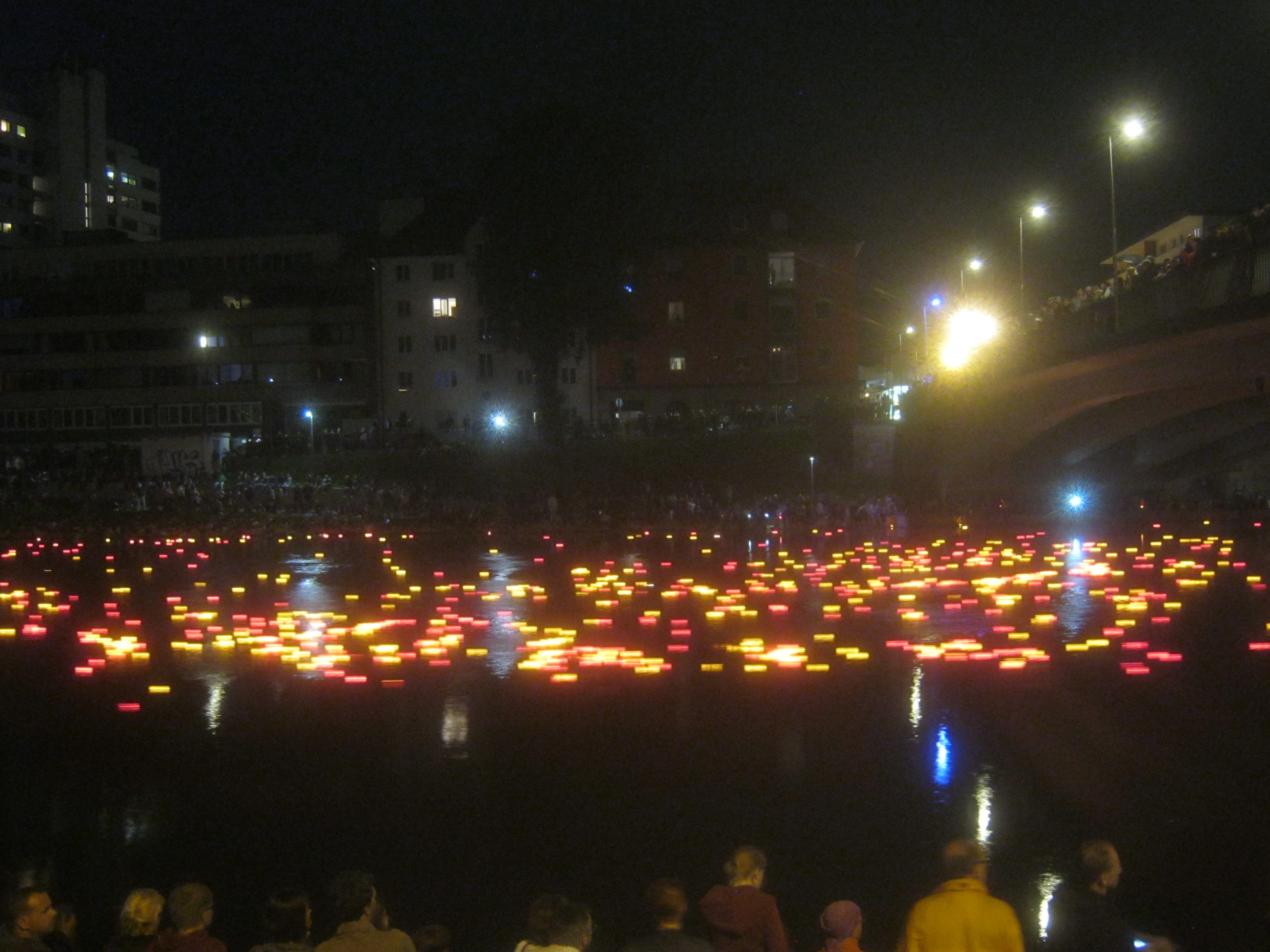 Lichterserenade Ulm, fotografiert vom Aufgang zur Gänstorbrücke